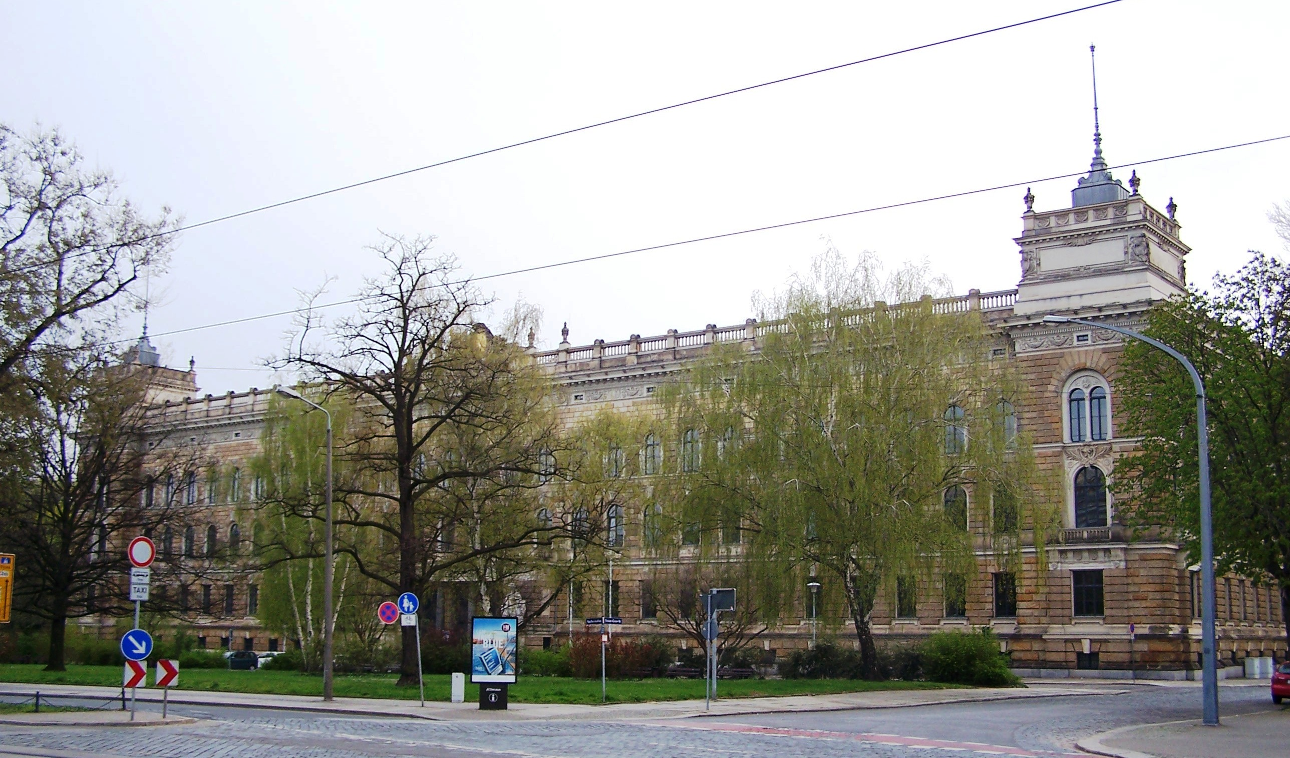 Amtsgericht Dresden, Architekt Arwed Roßbach. Heute als Landgericht genutzt